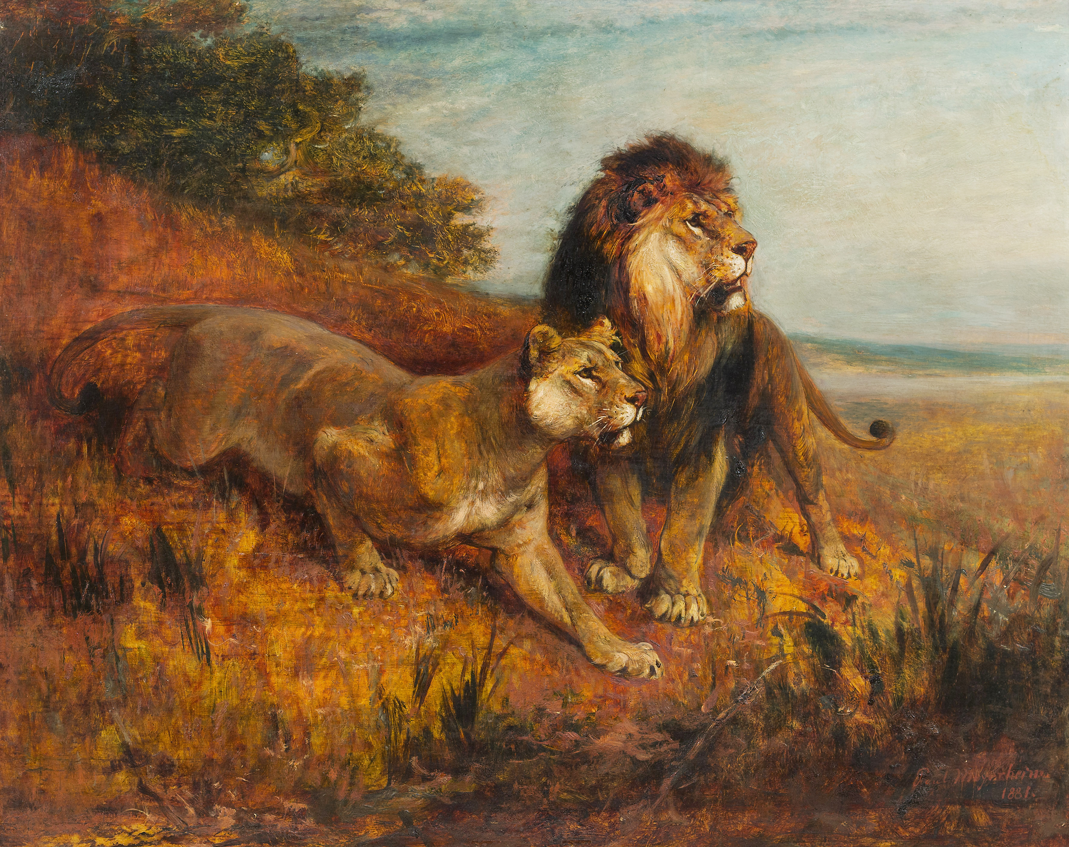 Paul Meyerheim: Auf der Lauer. Öl auf Holz, 56 x 72 cm, rechts unten signiert und datiert